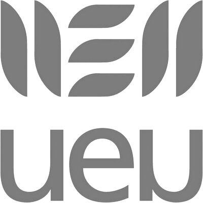 UEUren logotipoa